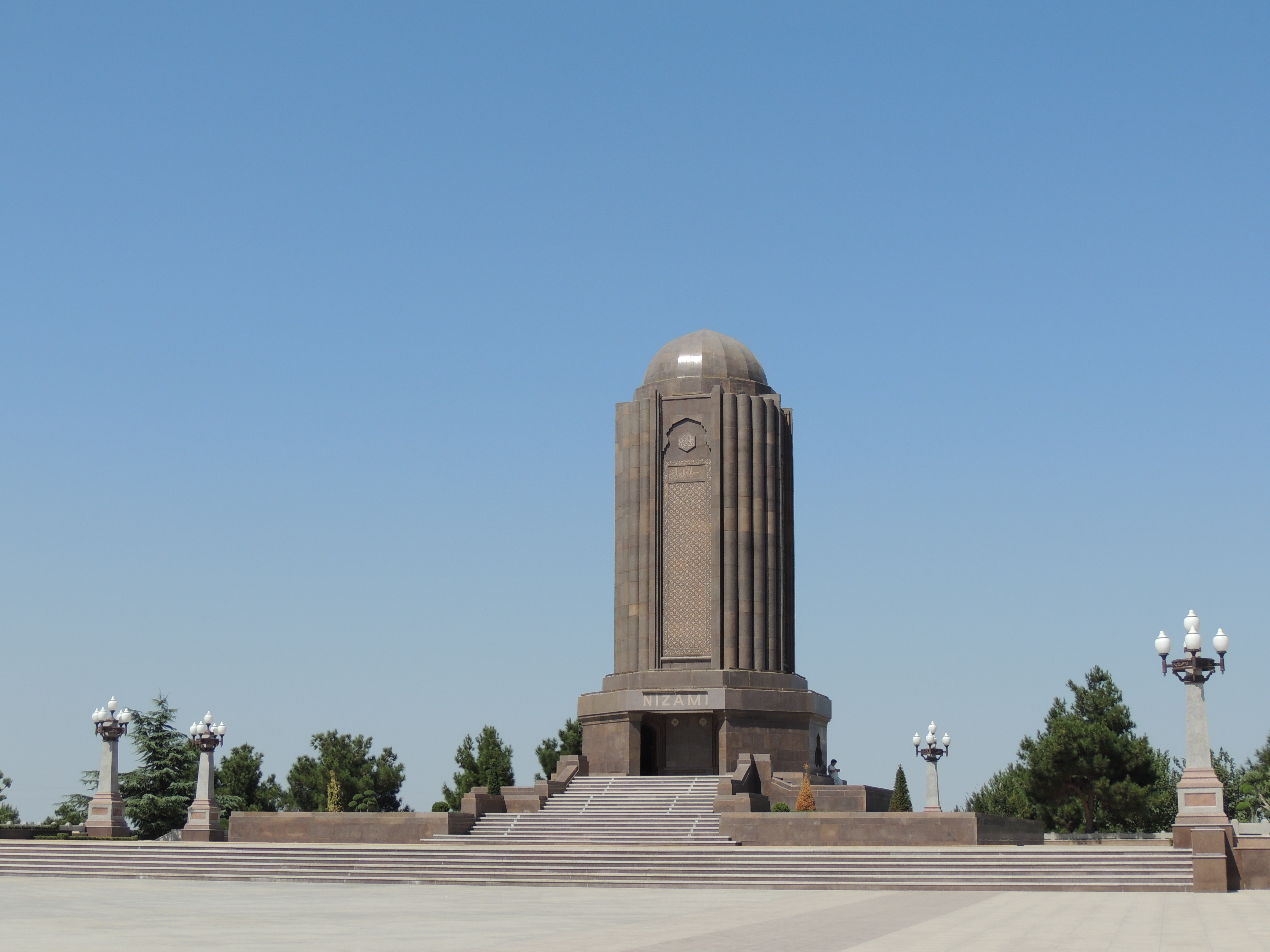 Nizami Gəncəvinin mavzoleyi, Gəncə, Azərbaycan.